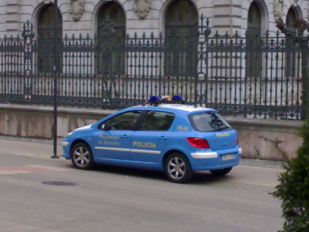 Coche de la Policía Nacional adscrita al Principado de Asturias.